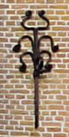 Bovenberg 54 Bouwlust Bergambacht (detail sieranker)